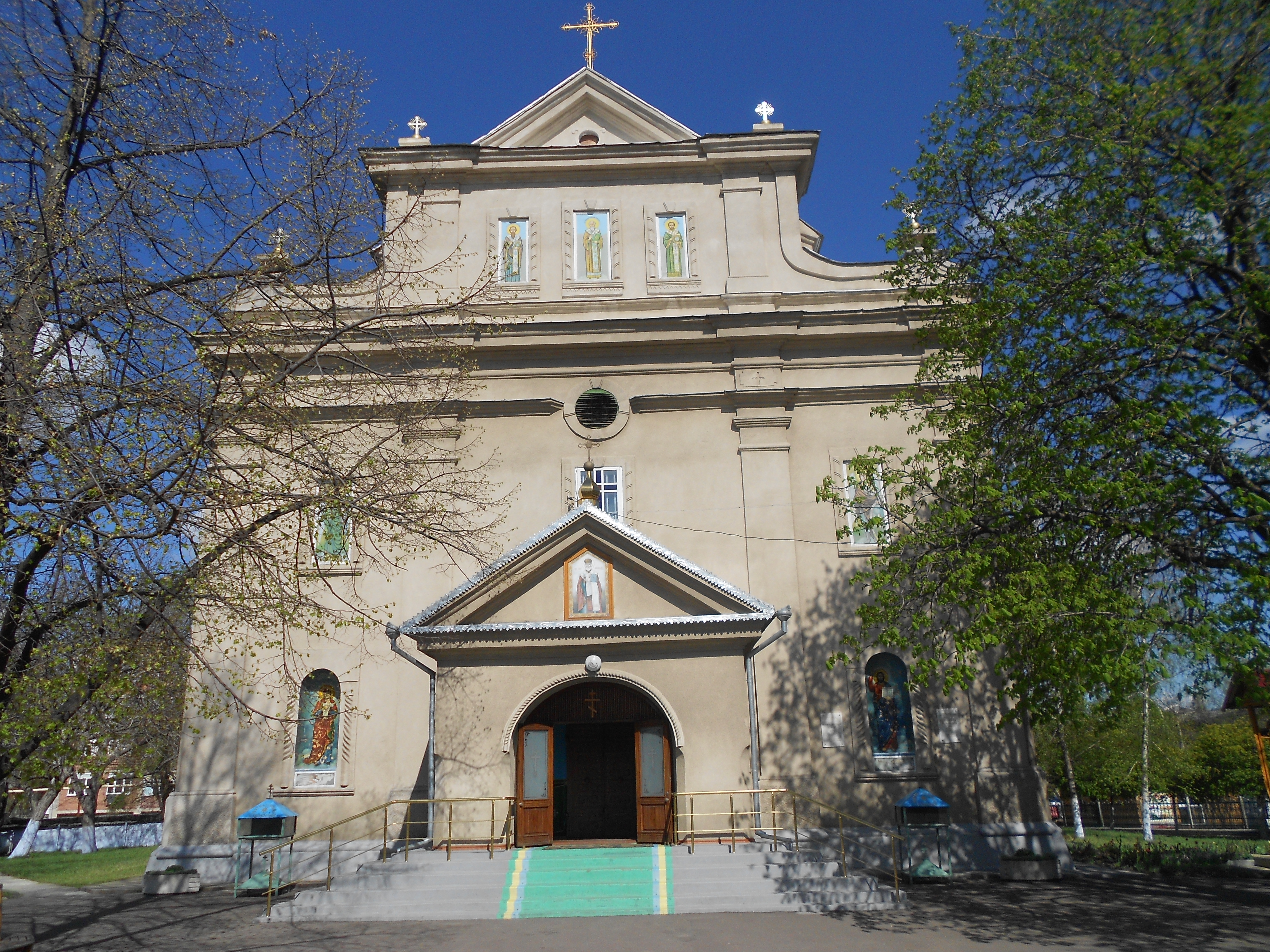 Catedrala Sf. Nicolae din Bălți